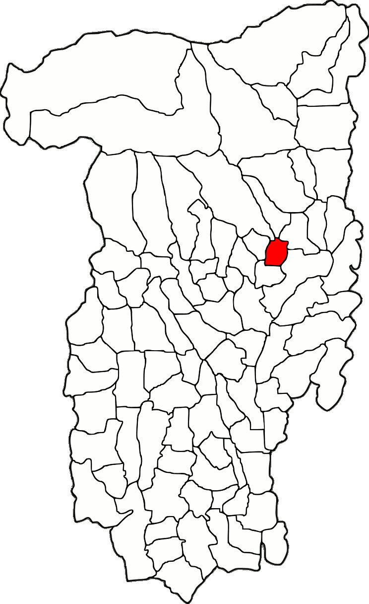 Lage der Gemeinde Vlădești im Kreis Vâlcea (RO).